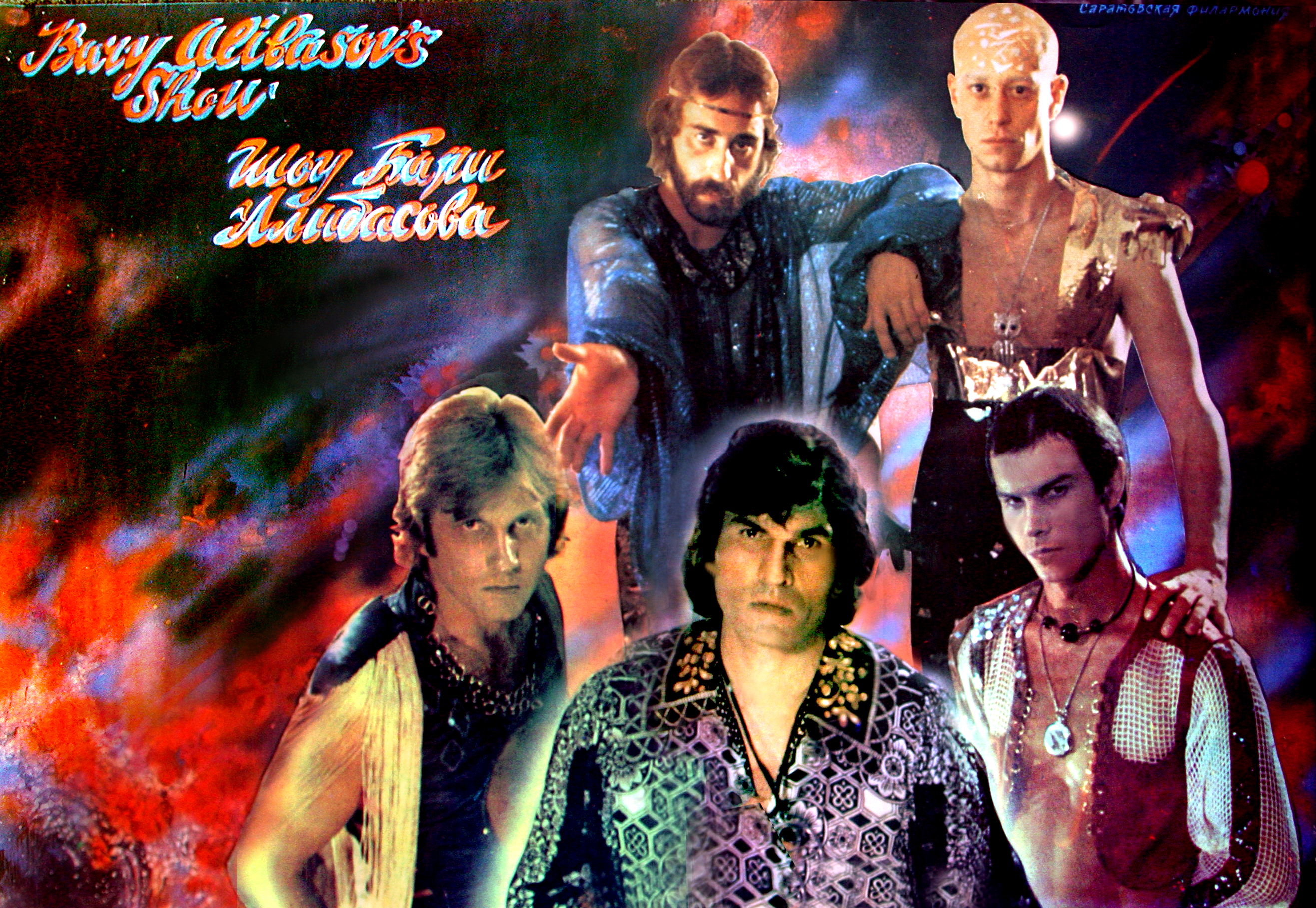 фотографии и афиши группы "Интеграл"